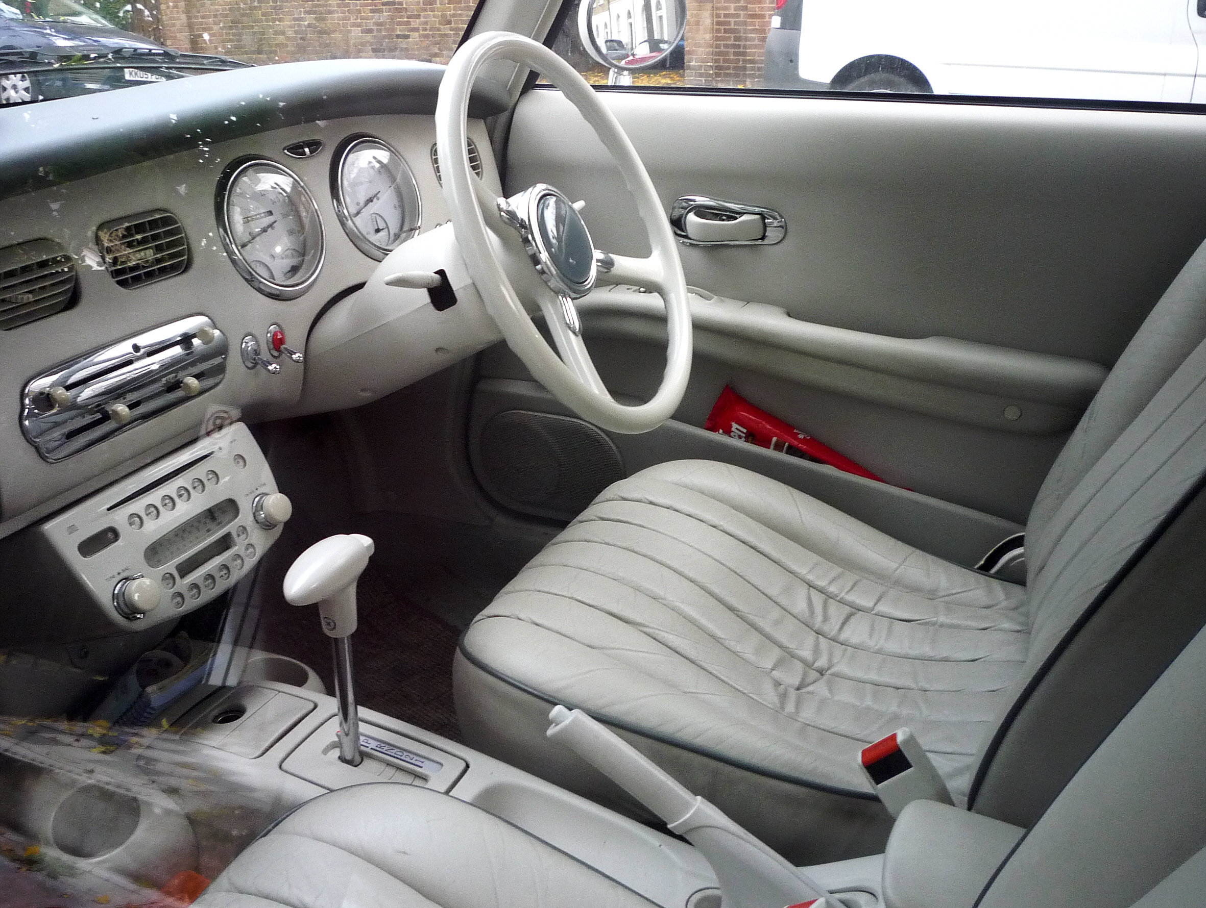 Innenansicht eines Nissan Figaro, Baujahr 1991. Das Design wurde dem Gutbrod Superior nachempfunden.